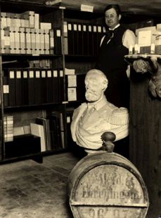 Ture "Tusse" Sjögren i det av honom skapade AFs Arkiv & Studentmuseum.